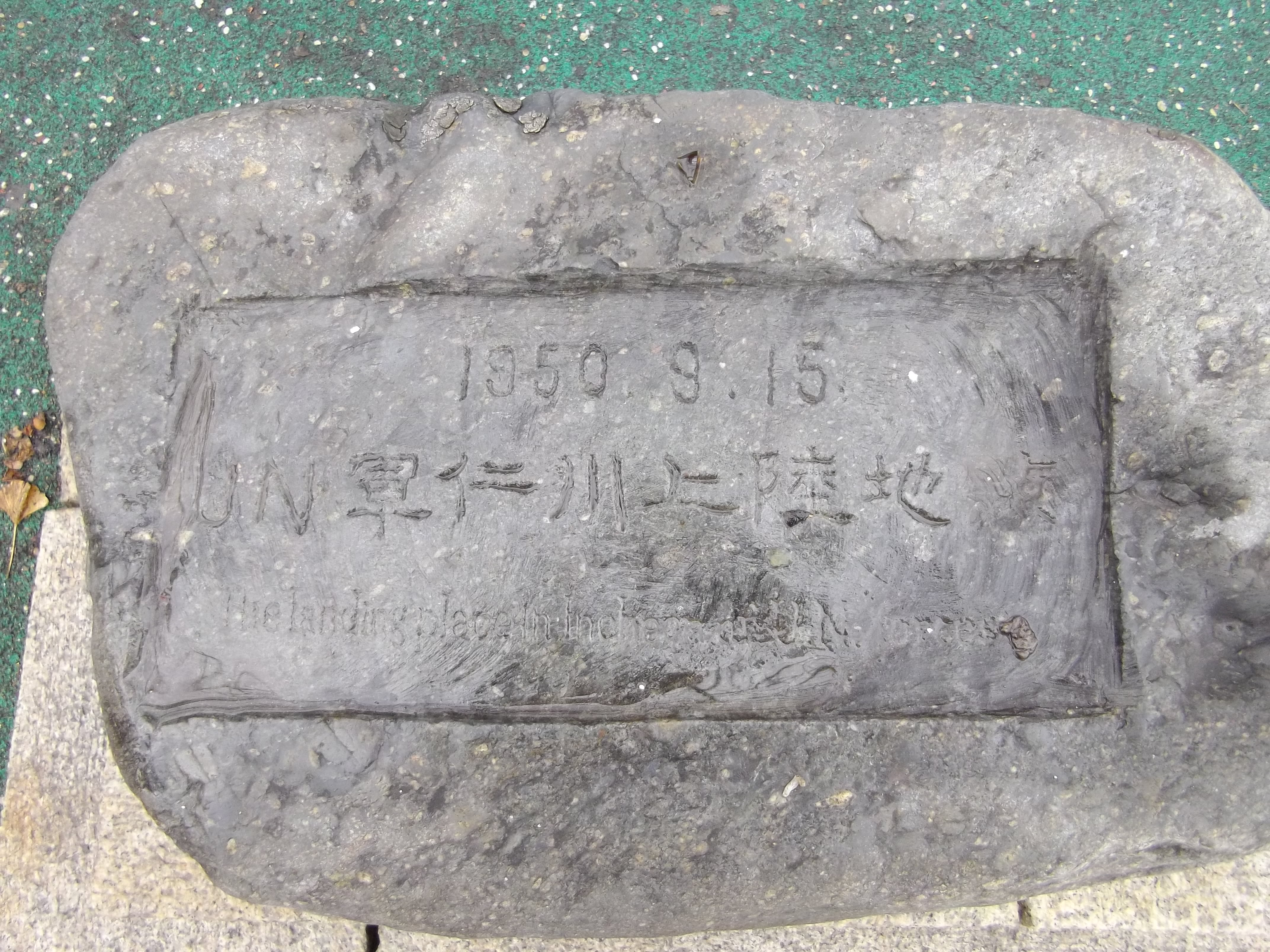 「1950.9.15 UN軍仁川上陸地」石碑 2013年1月23日、大韓民国仁川広域市月見島の街角で撮影。